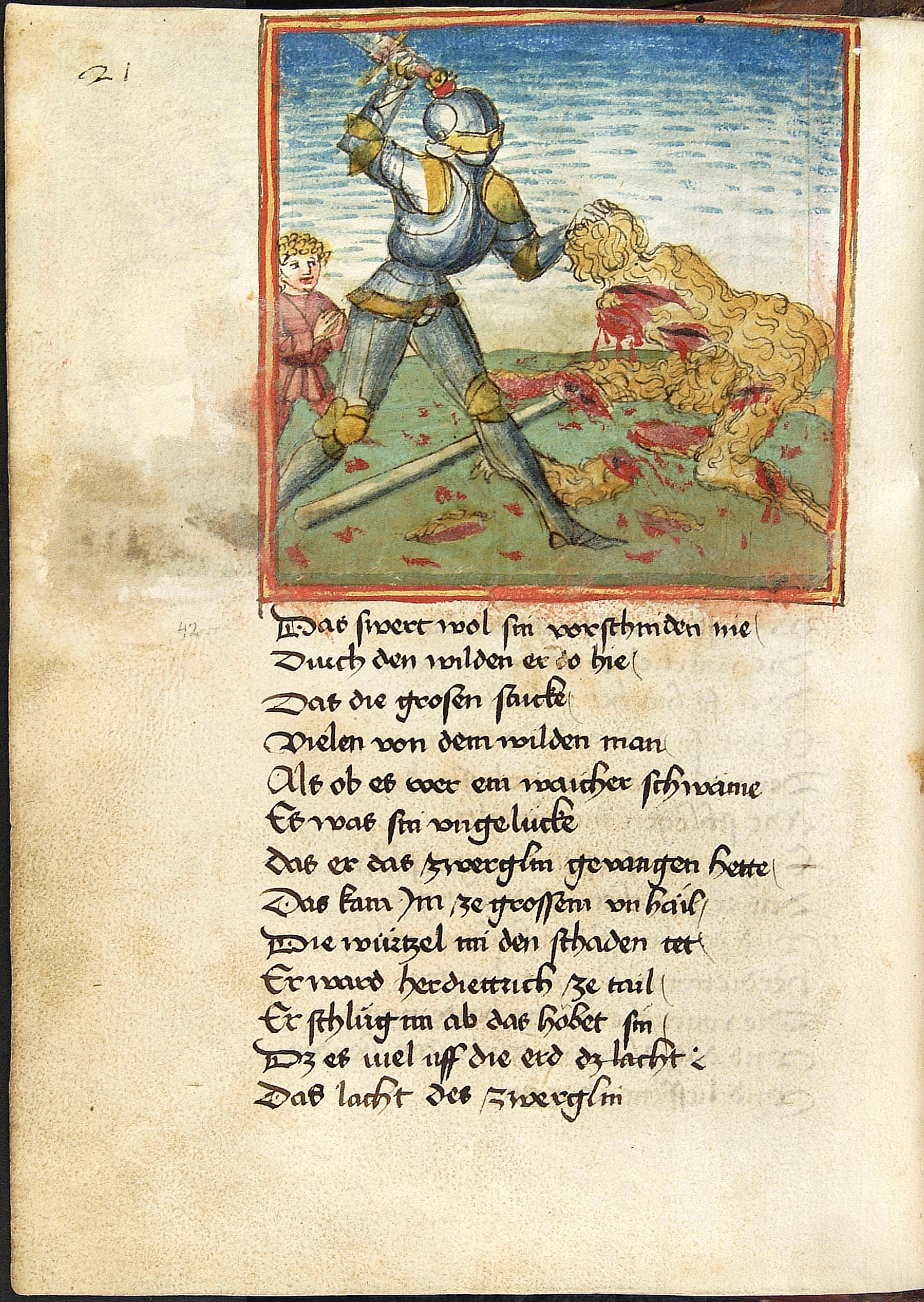 Codex Palatinus germanicus 67, Blatt 21v - Sigenot, Dietrichs Kampf mit dem wilden Mann, Dietrich hält den wilden Mann am Kopf und schlägt ihm die Arme ab, der Zwerg Baldung scheint zu applaudieren (Bild 13 von 14 dieser Kampfdarstellung)